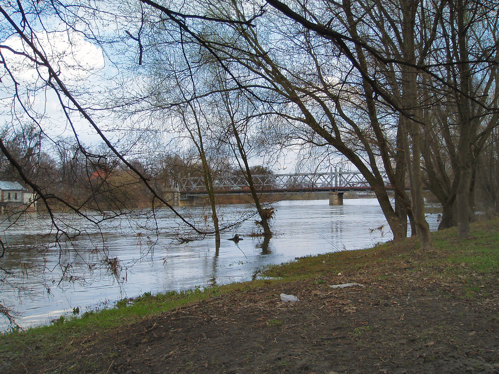 2006-04-16 14-10-08 Wielkanoc Brzeg